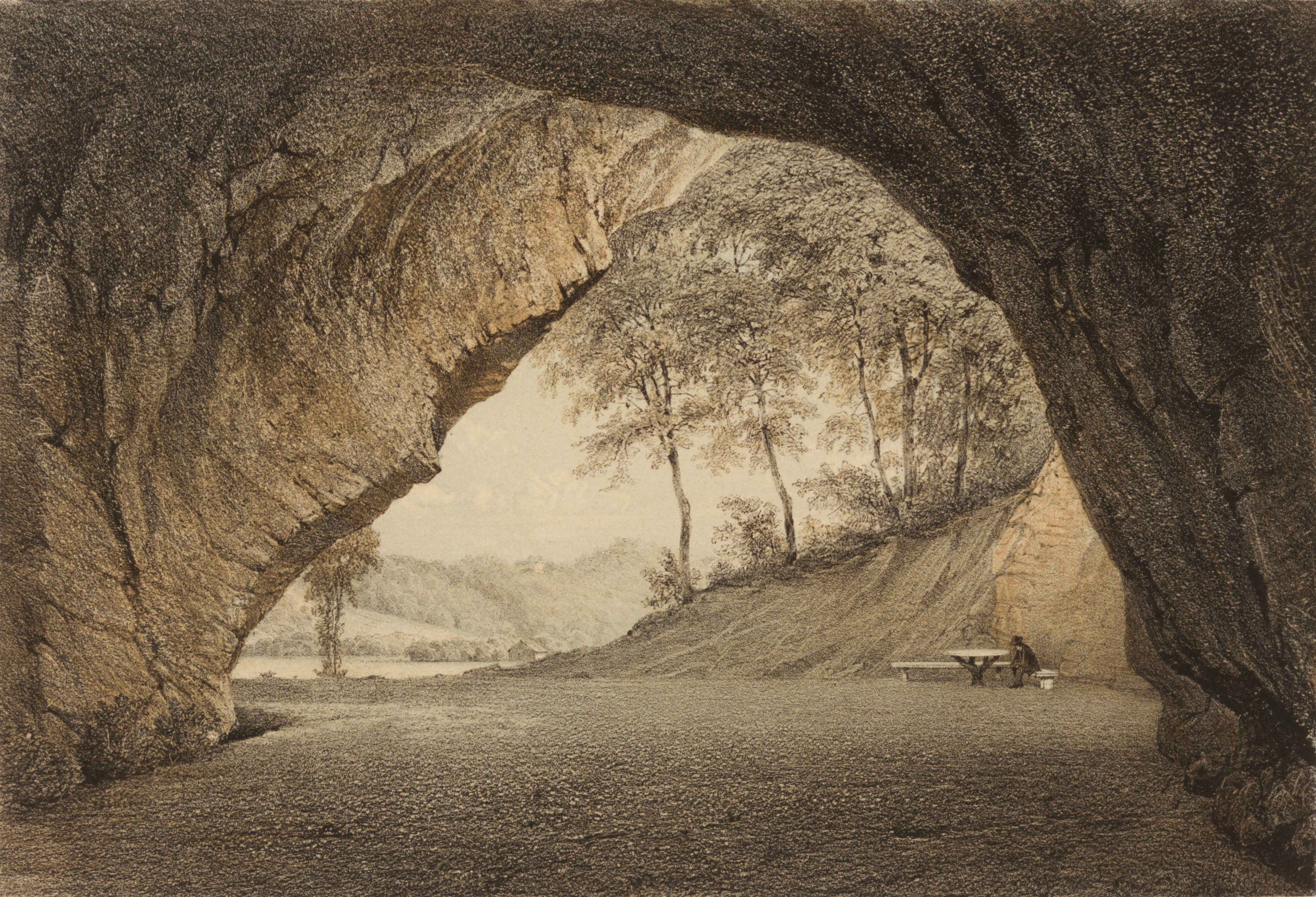 Tartu album. Vaade Gutmani koopast. MUIS: TKM TR 4038 H 31:23